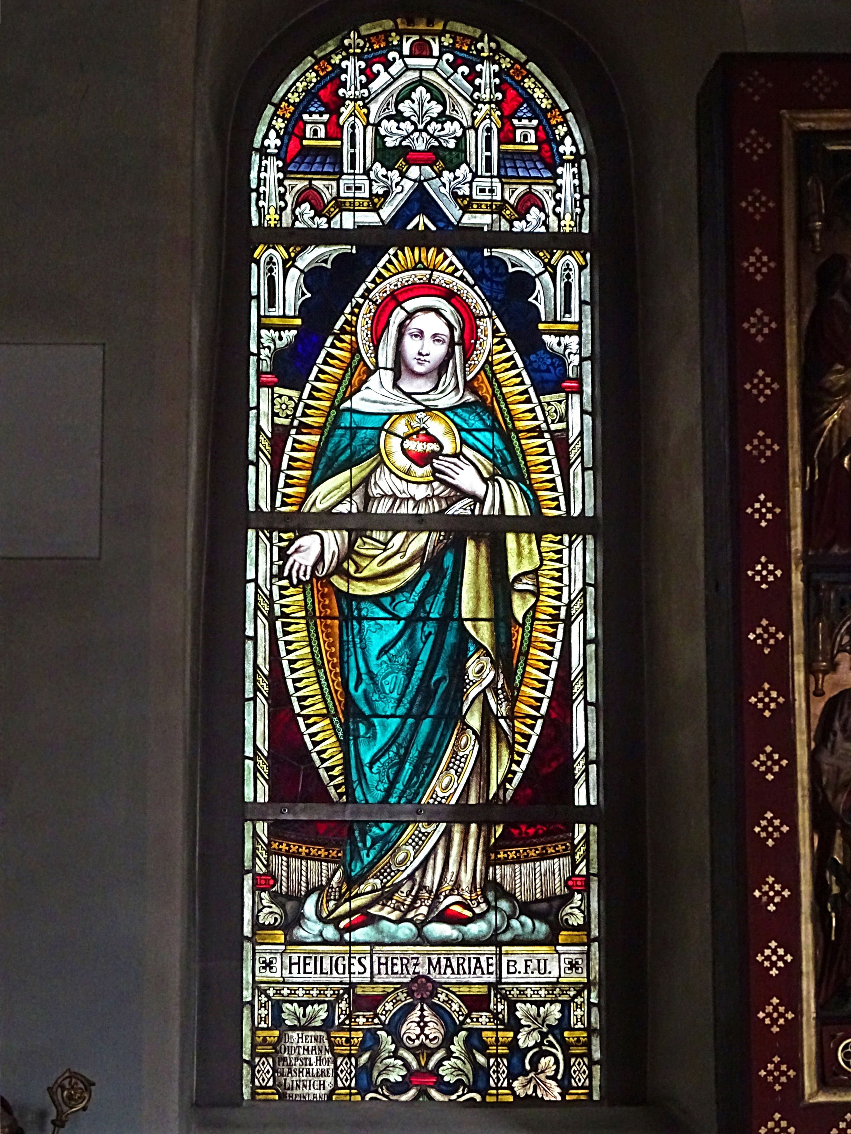 Buntglasfenster (linkes Chorfenster) in der Nikolauskirche (Neuendorf)